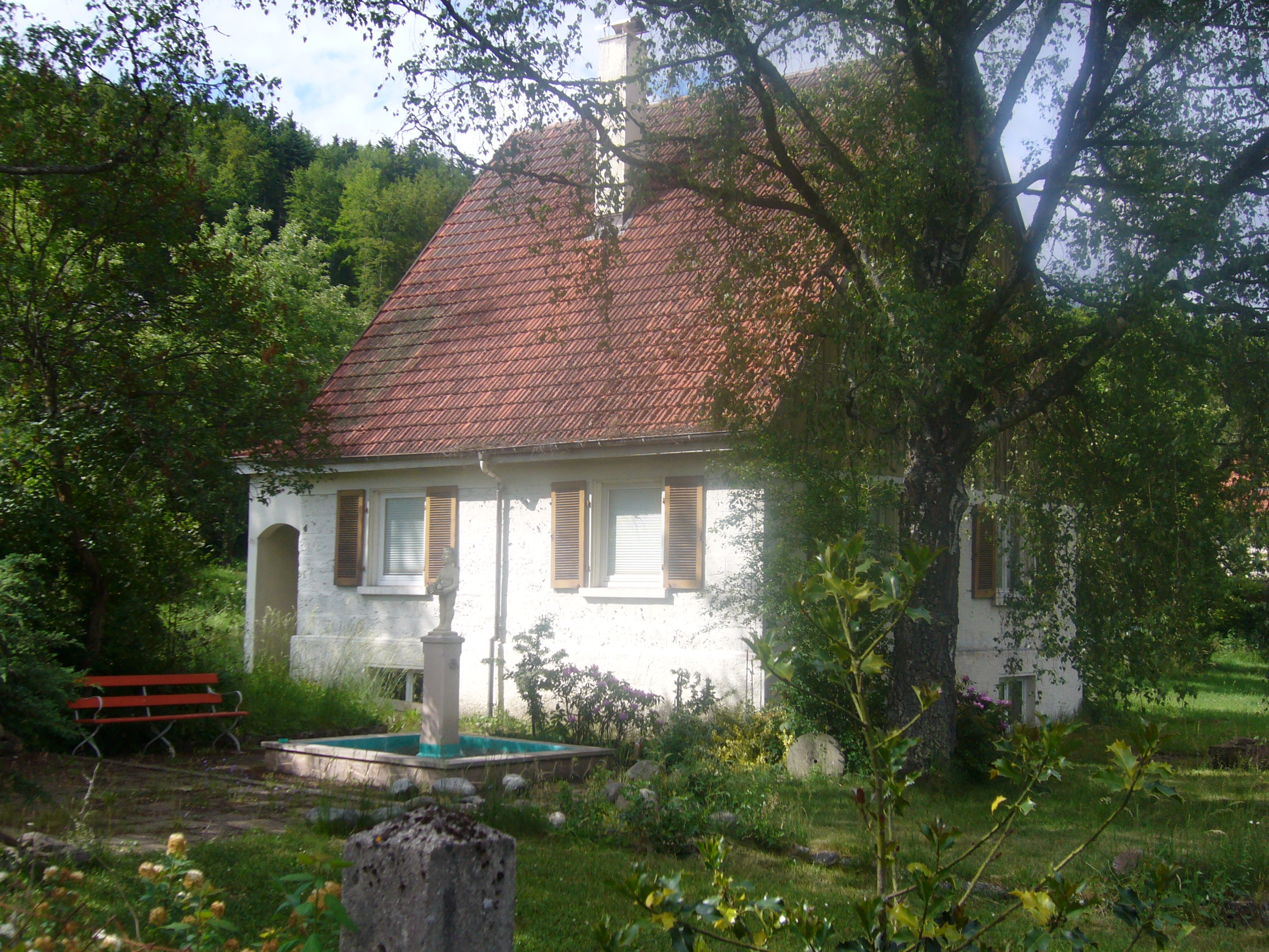 Das Bild zeigt ein Wohnhaus im Tuttlinger Ortsteil Koppenland, das in den 1930er Jahren aus dem abgebrochenen Empfangsgebäude des Bahnhof Tuttlingen erbaut wurde.